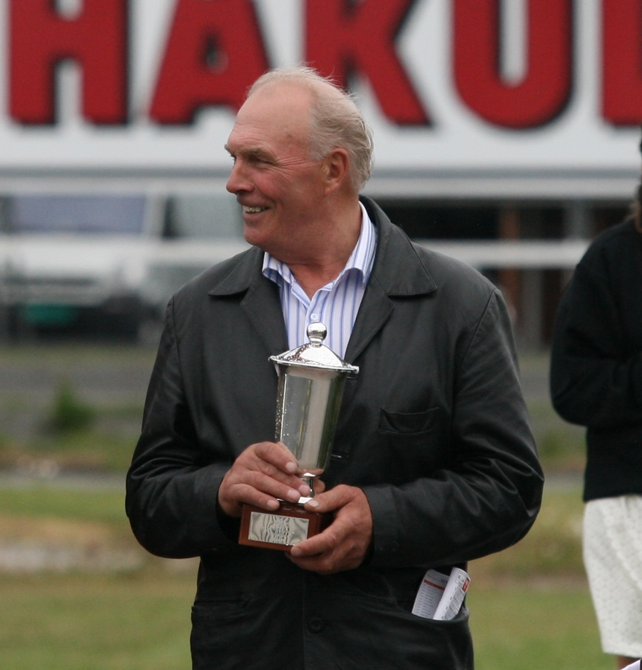 Kjell Håkonsen deler ut pokal etter løpet Rex Rodneys ærespris.